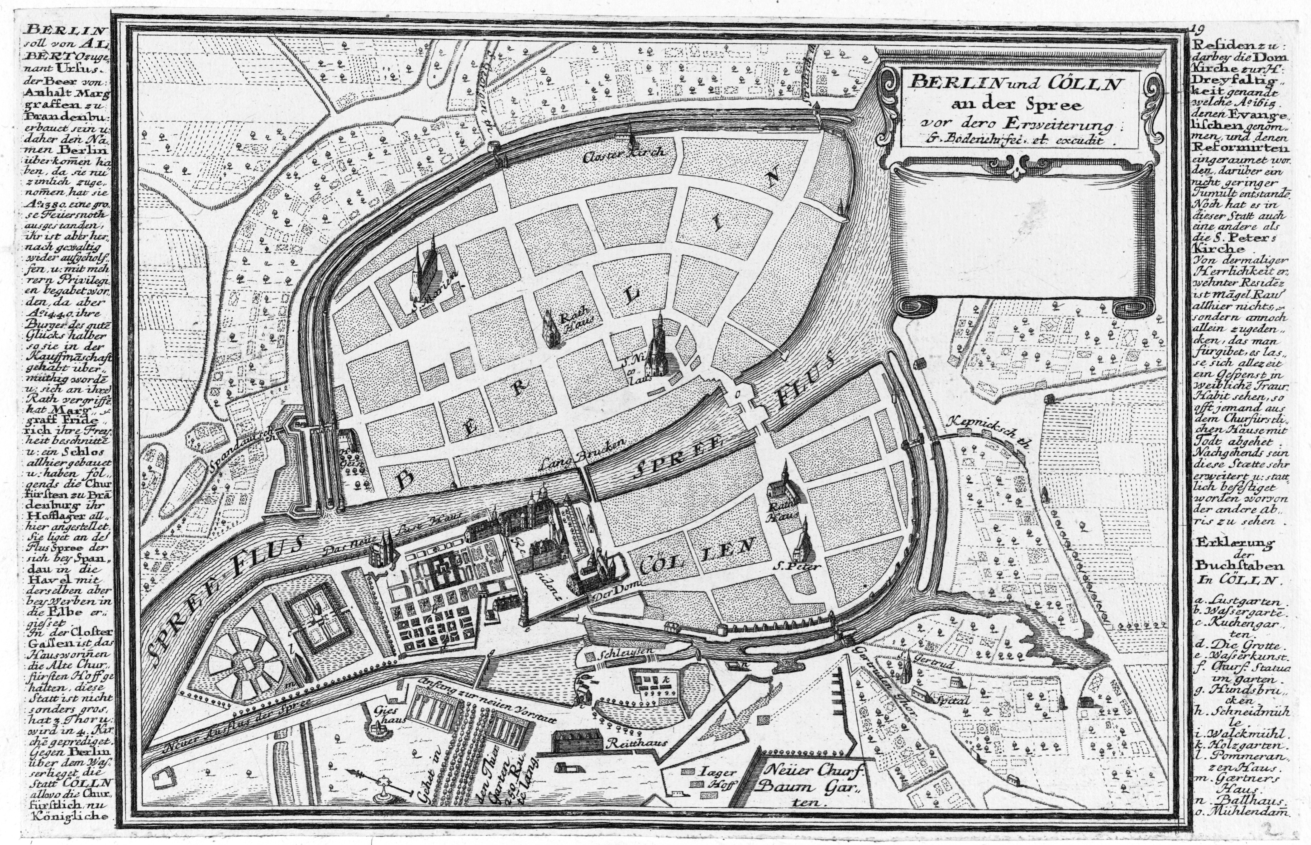 Grundriß der beiden kurfürstlichen Residenzstädte Berlin und Cölln. Verkleinerte Kopie des Memhardt-Plans, erschienen in Force d'Europe von Gabriel Bodenehr (der Ältere) um 1720.